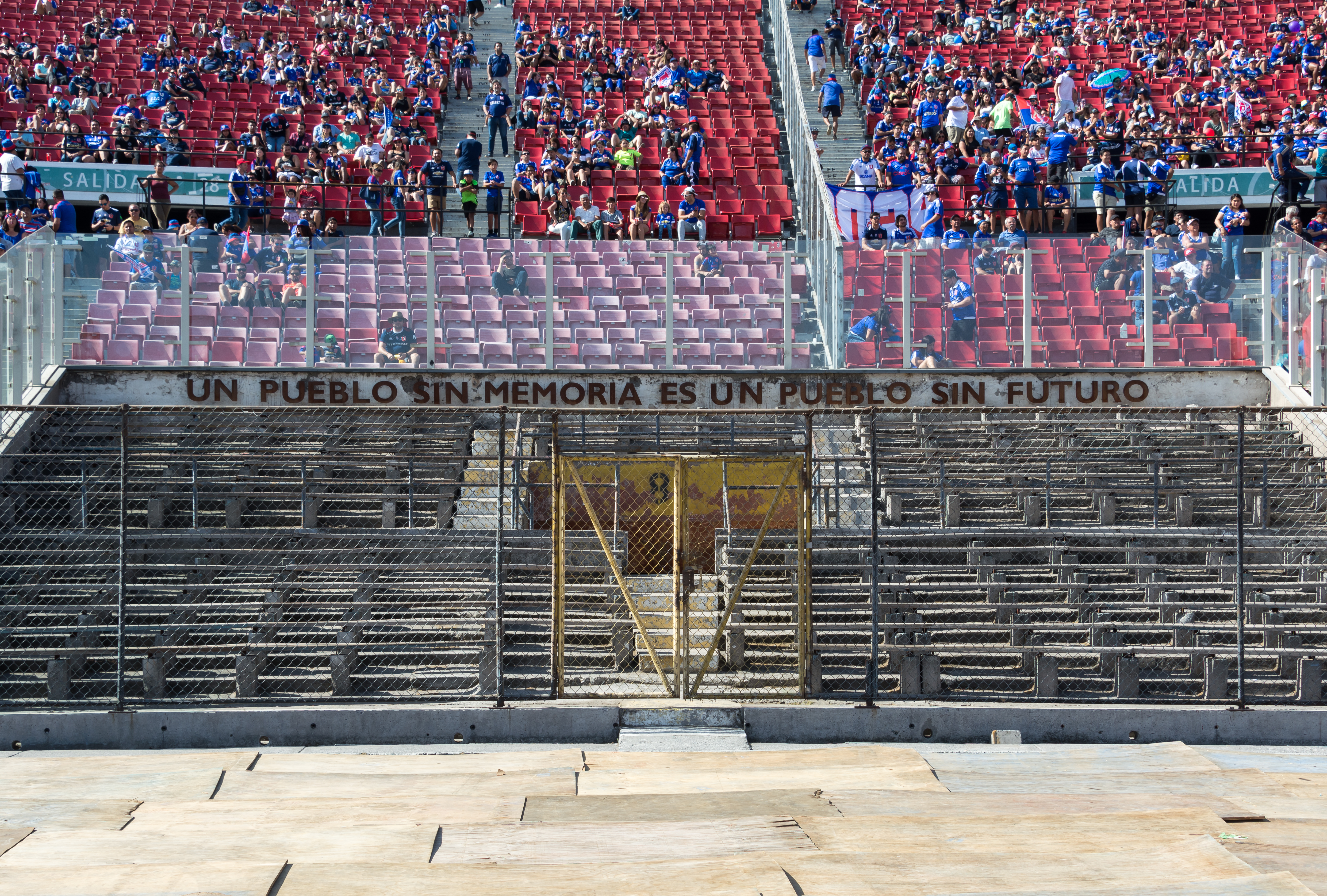 Memorial del Estadio Nacional, Universidad de Chile v Unión Española, Estadio Nacional Julio Martínez Prádanos, Ñuñoa, Santiago, Región Metropolitana, Chile.